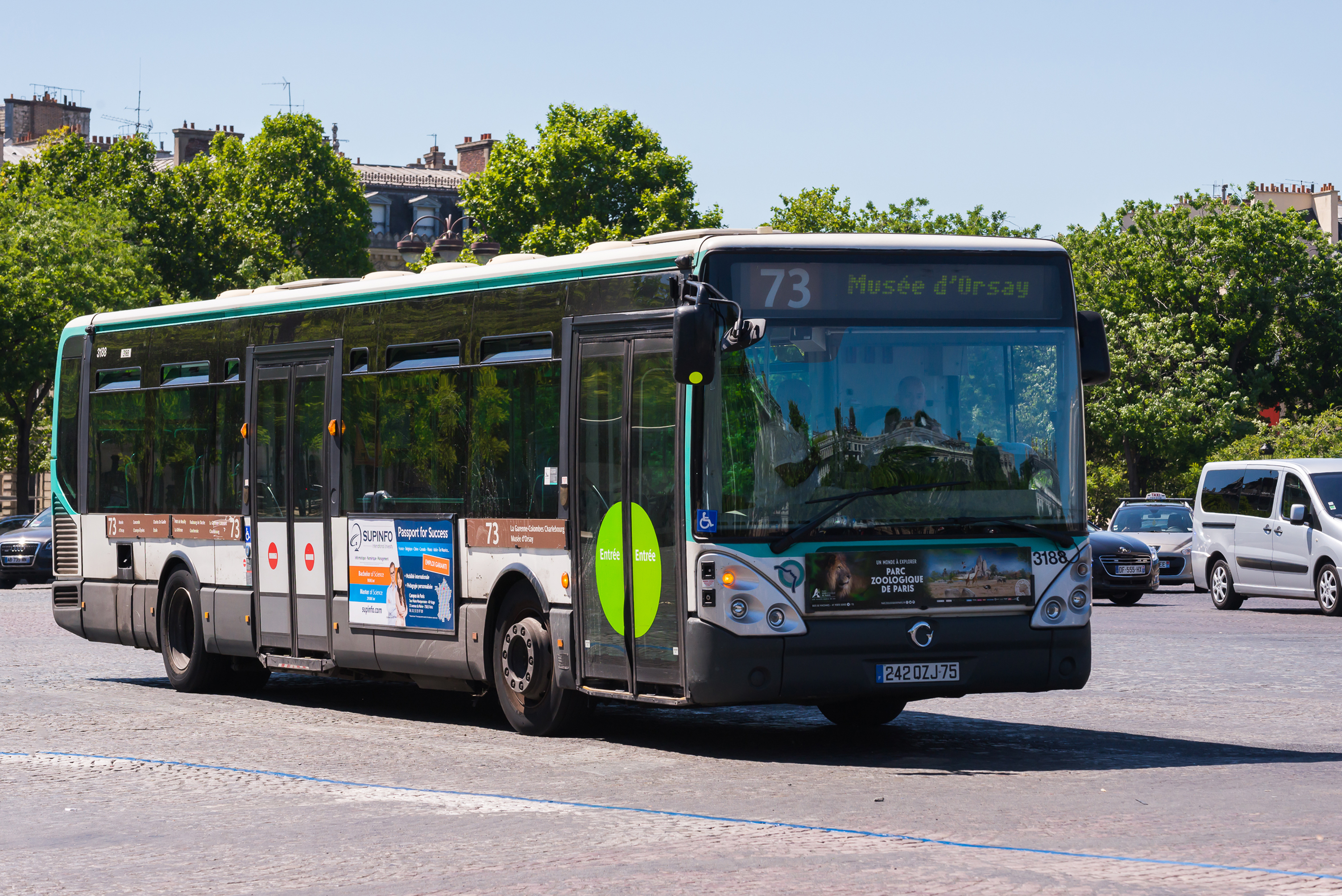 Bonne illustration de la difficulté de l'exercice, après plusieurs essais infructueux (et avoir bien grillé au soleil) je me suis rabattu sur ce Citélis, qui sont en voie d'émigration vers Nanterre... Bus transport in Paris and Île-de-France.